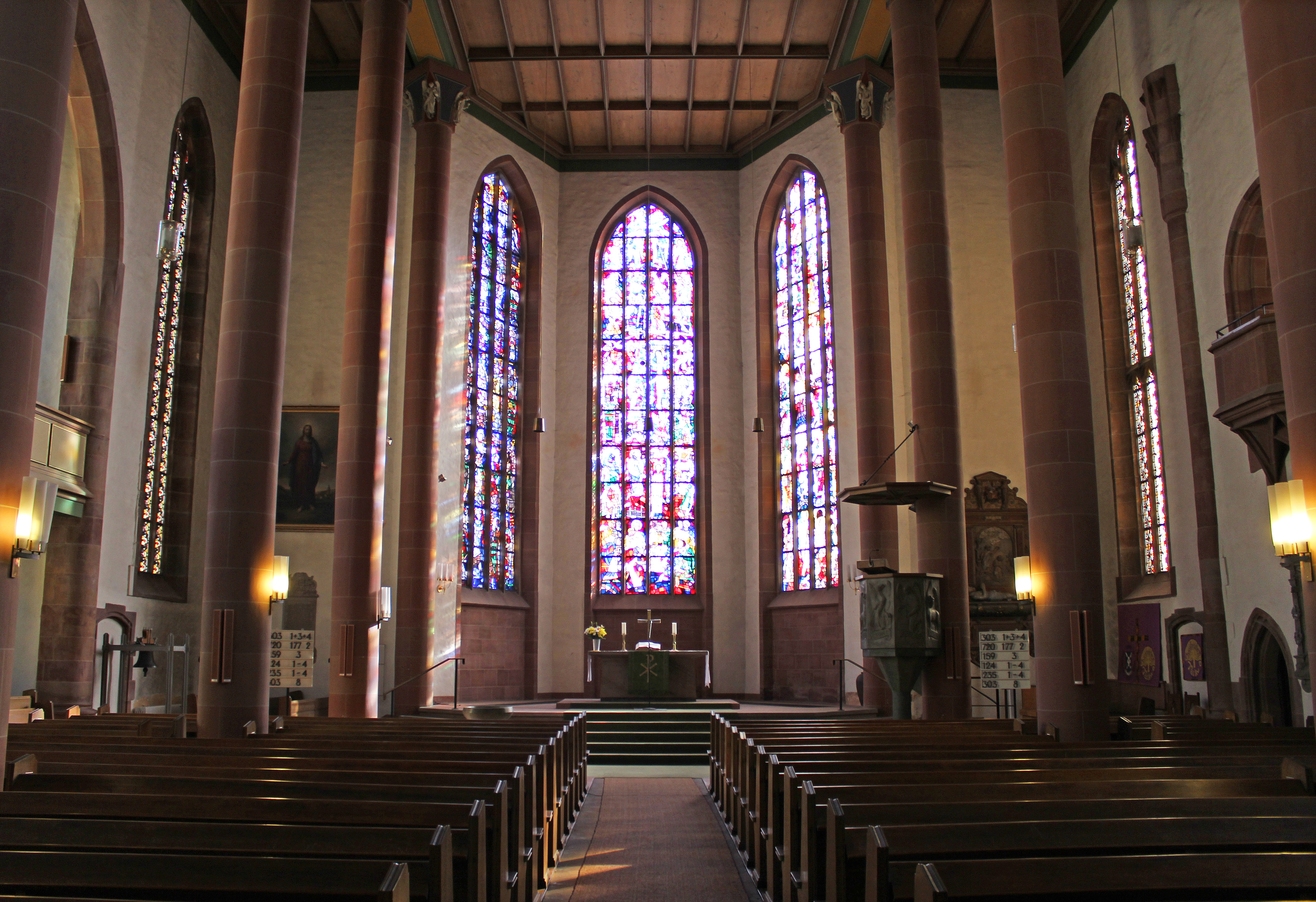 Blick ins Innere der evangelischen Alexanderskirche in Zweibrücken, Rheinland-Pfalz.